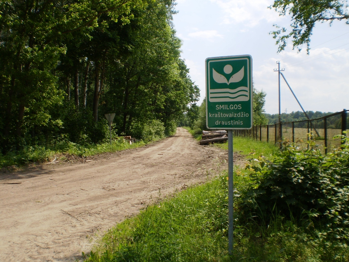 Smilgos kraštovaizdžio draustinis ties Palainiškiais, Kėdainių raj.